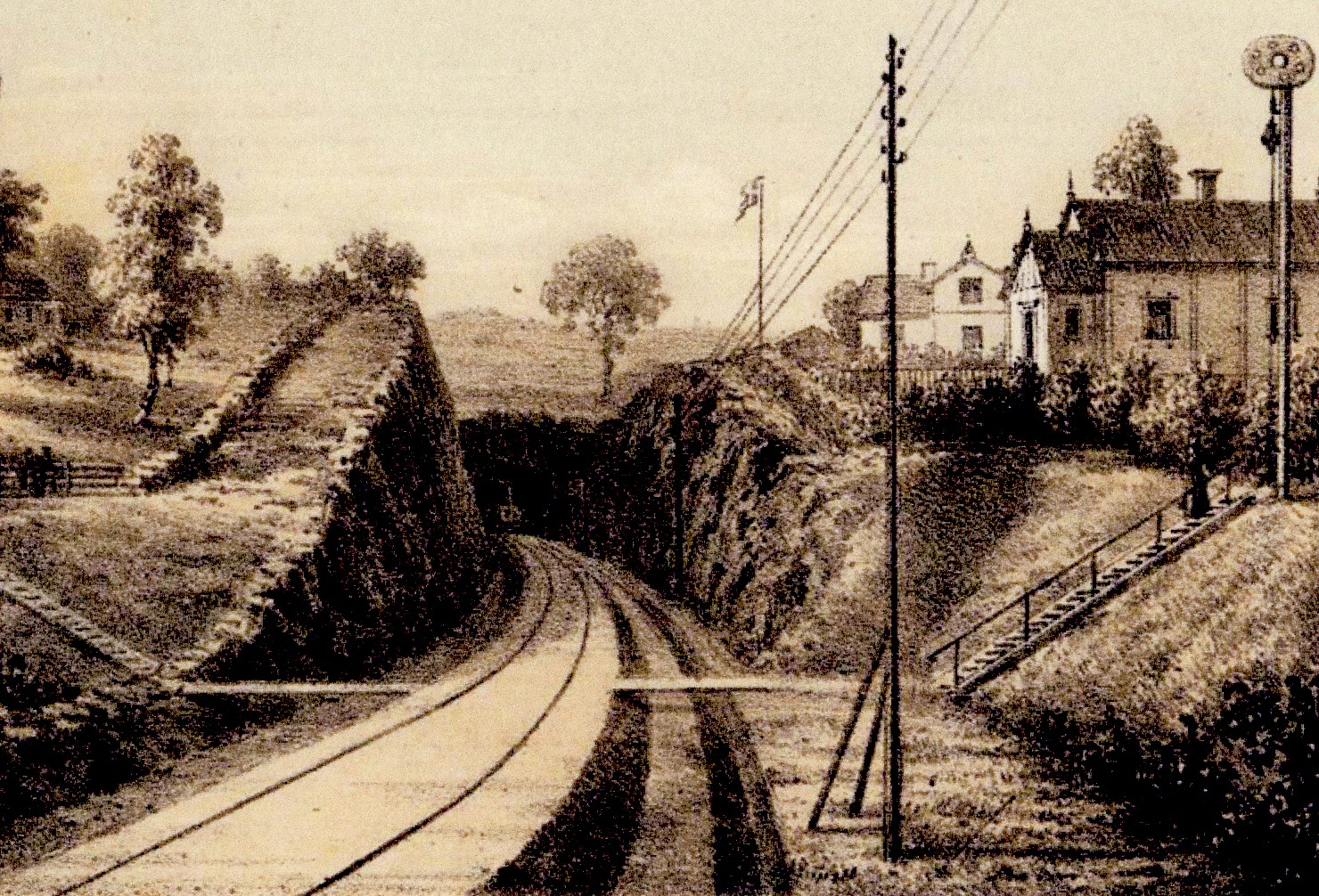 "16 Utsigter i färgtryck af sammanbindnings-banan genom Stockholm och dess utsträckning till Liljeholmen: med plan och profilkarta samt text. "